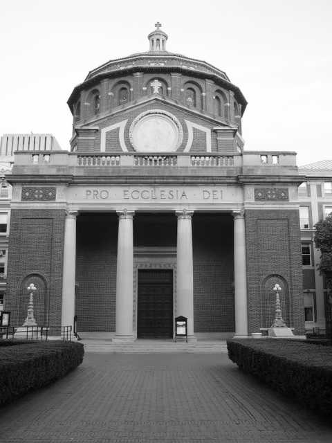 Earl Hall Center, St. Paul's Chapel, Columbia Universität